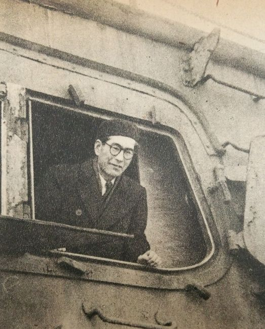 三笠乗艦中の新田潤